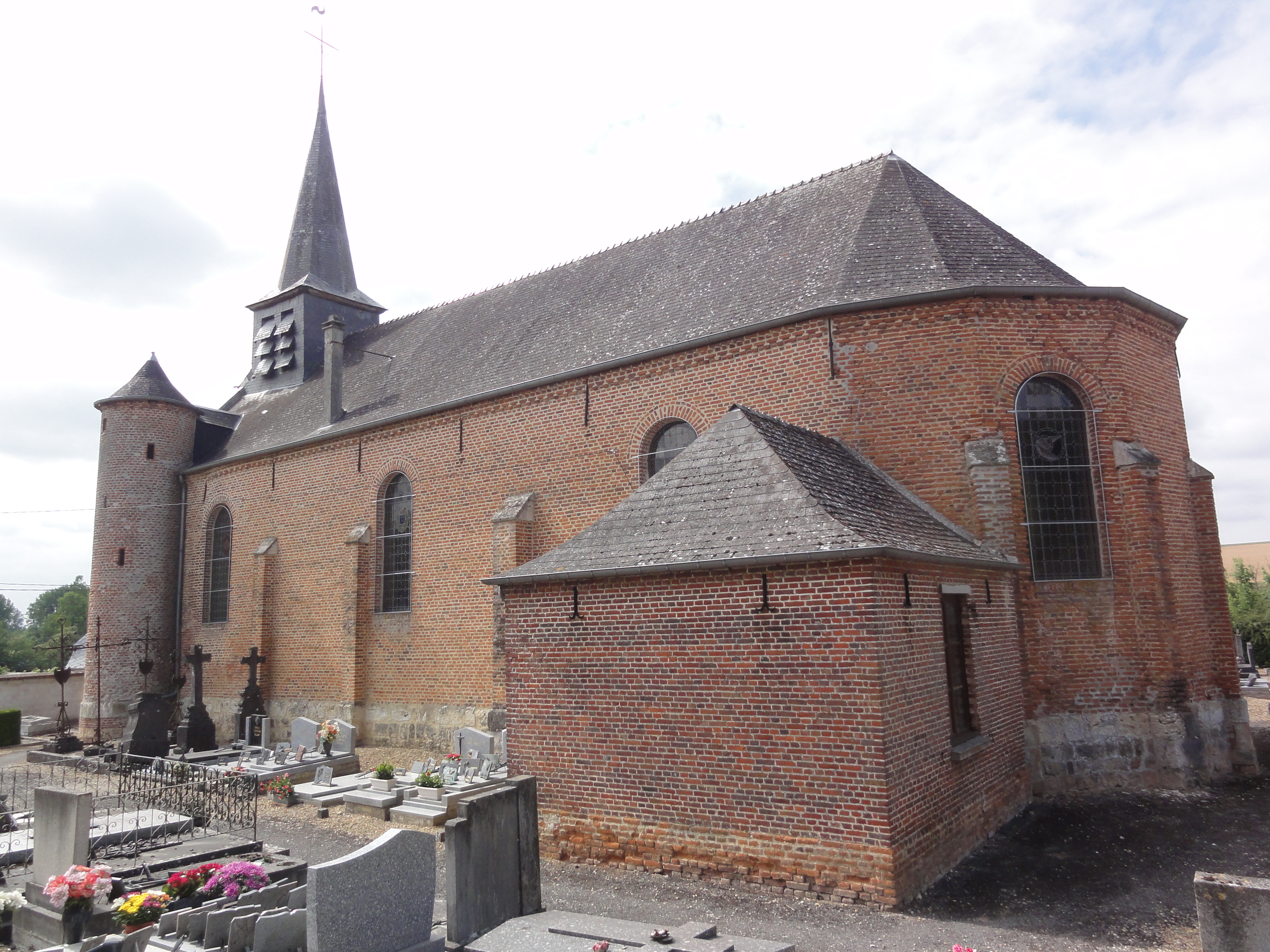 Église Saint-Côme et Saint-Damien de Thenailles